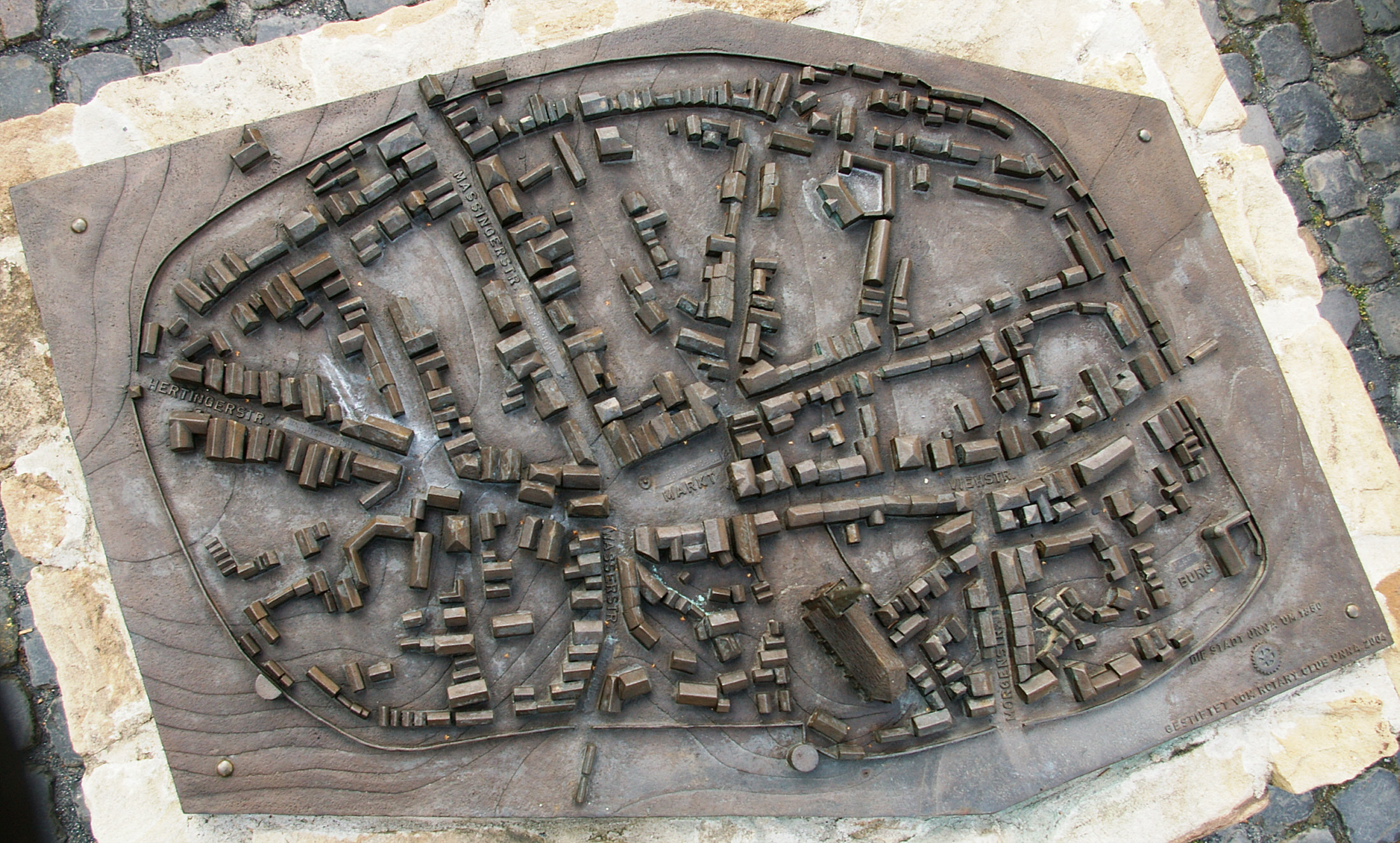 Bronzemodell nach einem alten Stadtplan, der Unna im Jahr 1860 darstellt. Aufgestellt an der Straße Am Krummfuß.